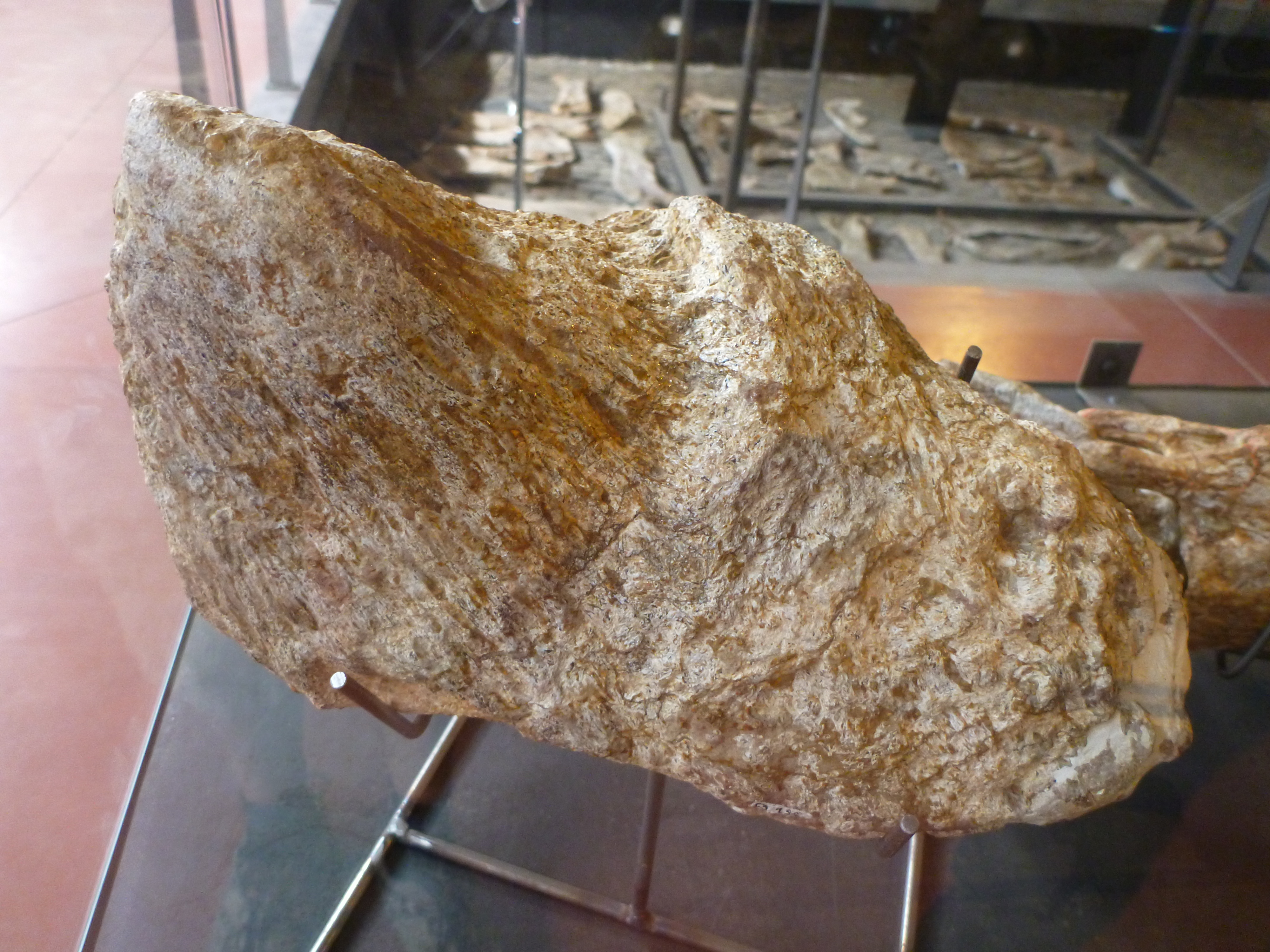 Ampelosaurus osteoderm, on display at the Musée des dinosaures, Esperaza, France